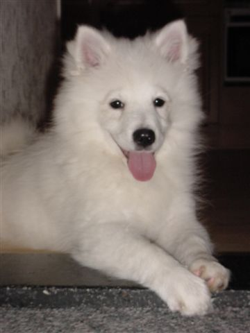 Keeshond "Sita", is mijn eigen hond